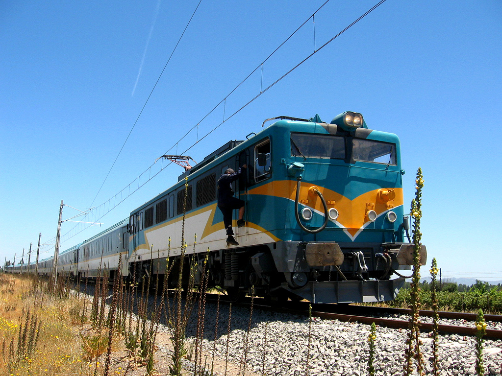 Para cerrar esta seguidilla de 3 fotos del Súper tren con 2 S269 en las cercanías de Chimbarongo, les dejo ésta, en el momento preciso en que el maquinista encargado del tren desciende de una de las máquinas para ir al otro extremo del convoy, subirse a la otra japo puntera y volver a Quinta. El personal a cargo del tren era 1 maquinista y 2 ayudantes (uno en cada "japoñola", resguardando que se activaran los sistemas de ventilación cuando la locomotora no estaba al mando y de estar atento a cualquier anomalía de la vía y de la propia máquina en la que estaba). En ese mismo instante, el maquinista cordialmente me invitó a subir junto a él a la otra S269 y a participar en las pruebas... :) Por cierto, no crean que todo el rato fue grabar y grabar. Pues, quedé a cargo de anotar todas las anomalías que habían en la vía (fundamentalmente, tiraduras). Composición especial S269.04 + 10 coches S10.000 + S269.01 realizando pruebas de la variante Chimbarongo - Teno, proveniente desde la nueva estación y SS/EE de Quinta. Saludos. Special train composition [S269.04 (engine) + 10 S10.000 cars + S269.01 (engine)] by testing the - then - new railway line from Chimbarongo to Teno, from the - then - new railway station and electrical substation of Quinta. Greetings! frronet c_commons | xtrapotrenes 20once.